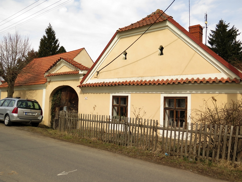 Usedlost čp. 40, Mokrouše 40, Mokrouše.